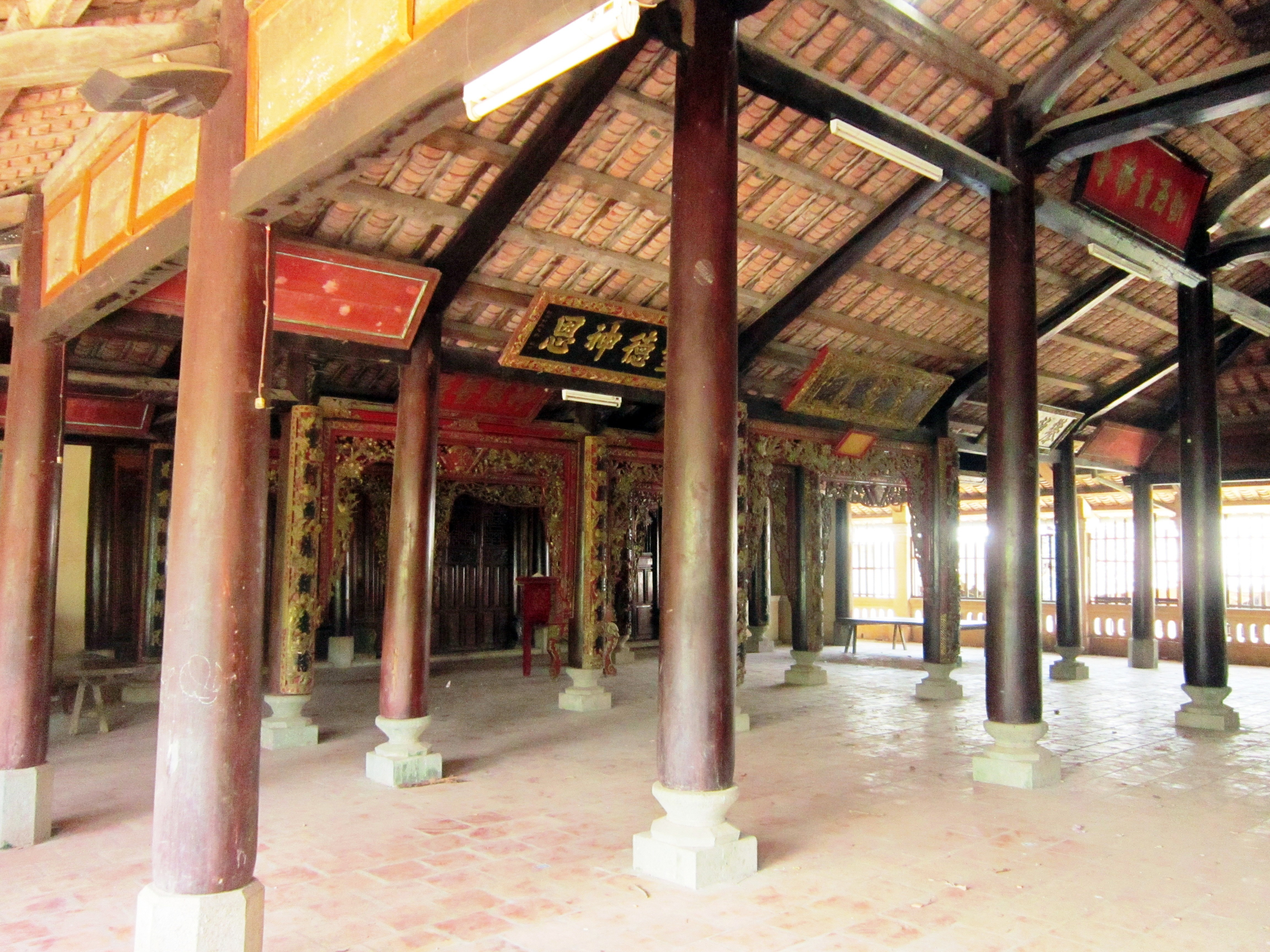 Đình Tân Thạch là một ngôi đình cổ; hiện tọa lạc tại ấp 9, xã Tân Thạch, huyện Châu Thành, tỉnh Bến Tre, Việt Nam.